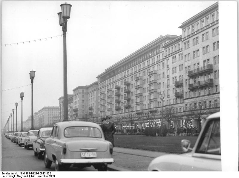 Zentralbild-Voigt-Vgt-Qu-14. 12. 1963 Berlin: Ein beliebter Anziehungspunkt für die Weihnachtseinkäufe ist die Karl-Marx-Allee.